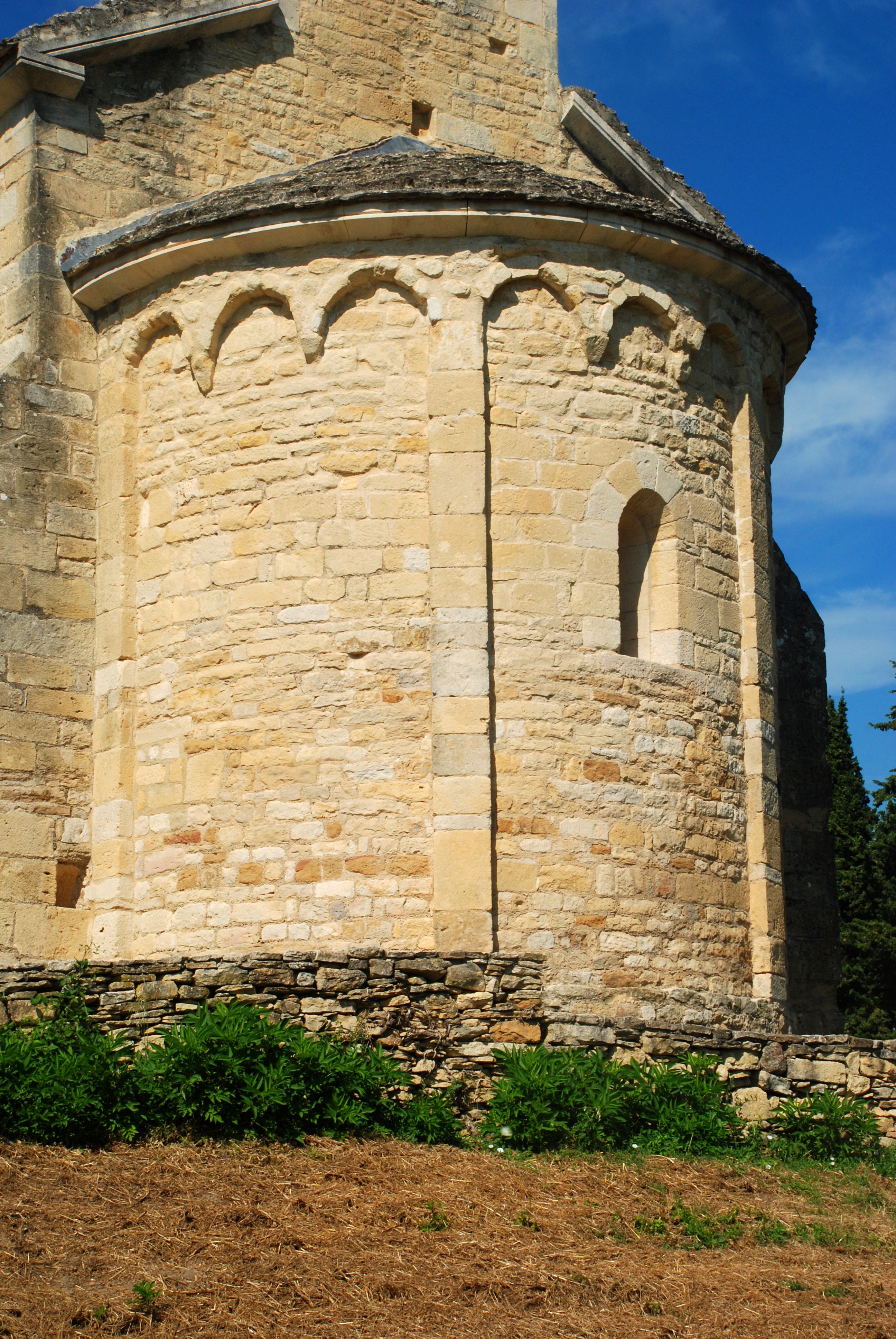 France - Gard - Chapelle Saint-Pierre de Vénéjan .